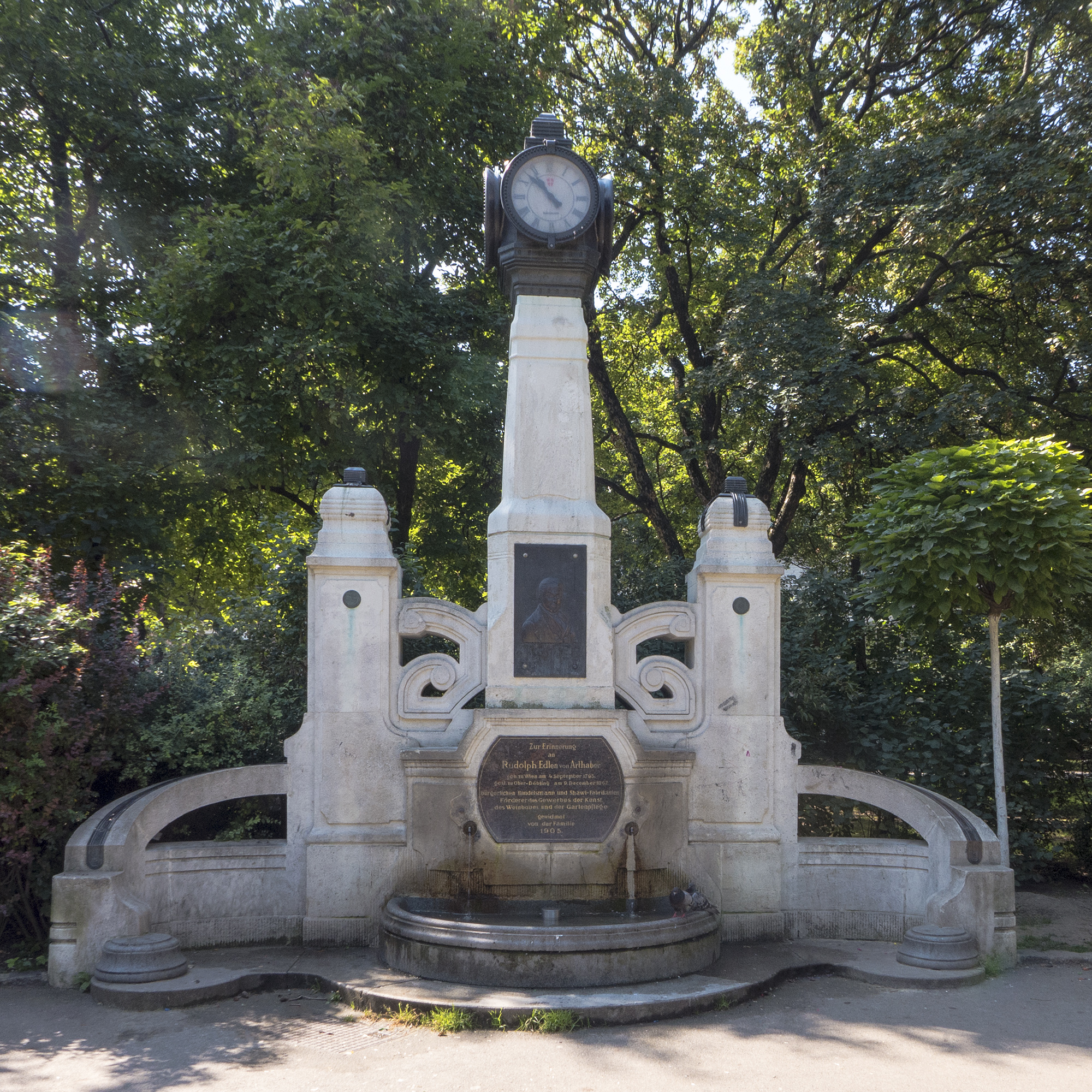 Arthaberplatz in Wien 10